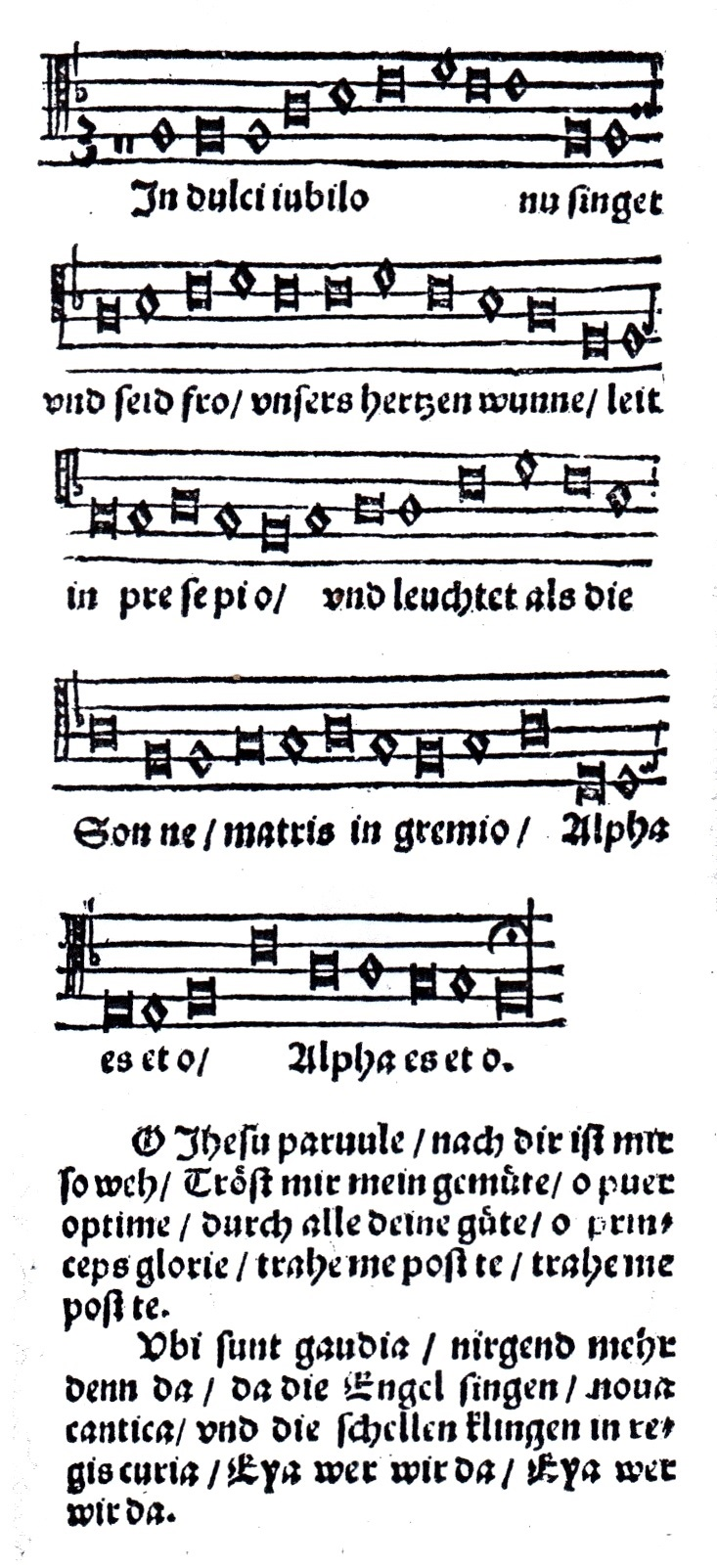 In dulci jubilo, aus Geistliche lieder auffs new gebessert zu Wittemberg (Klug'sches Gesangbuch 1533)